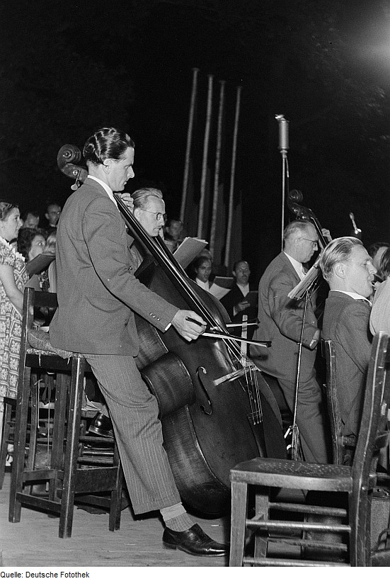 Original image description from the Deutsche Fotothek Musiker mit einem Kontrabass